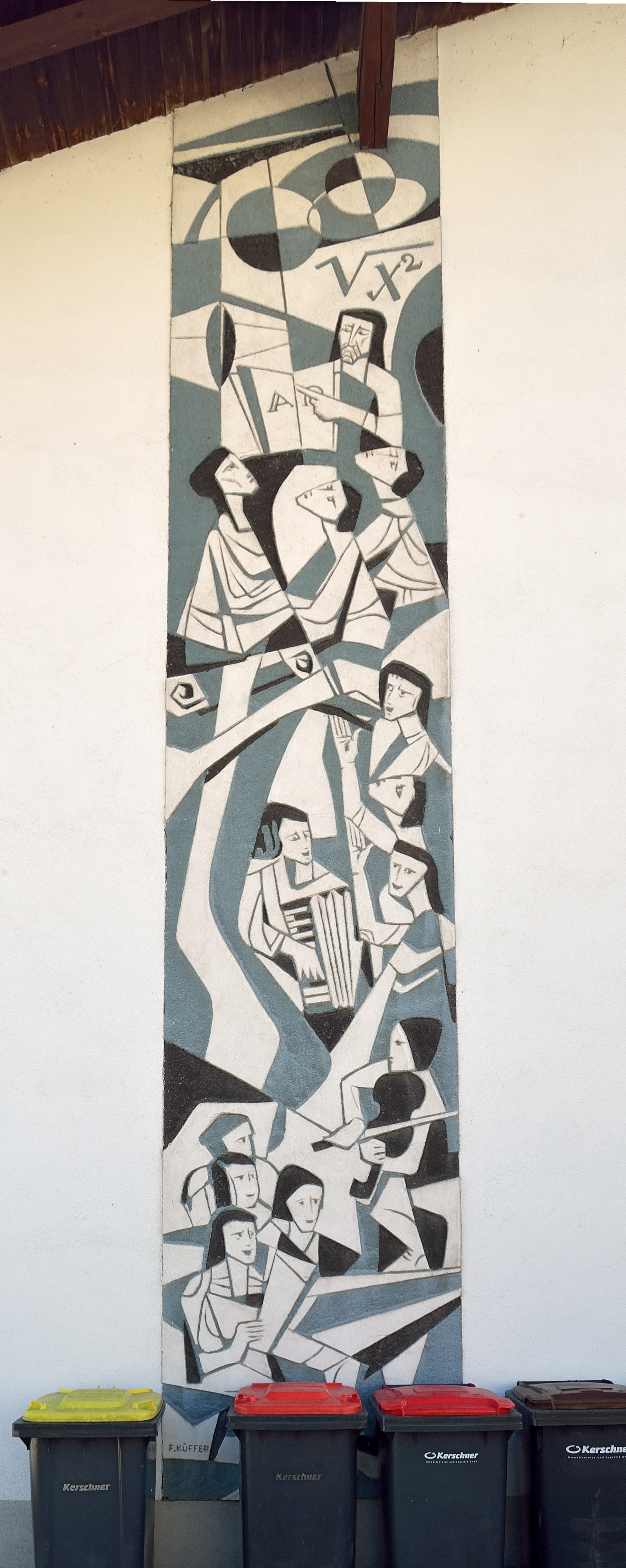 Sgraffito von Fritz (Friedrich) Küffer am Gebäude der Volksschule in Ramsau, Niederösterreich.